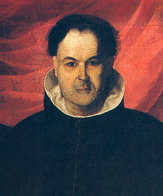 Cipriano de Medina y Vega (1594-1664) , catedrático sanmarquino y obispo de Huamanga